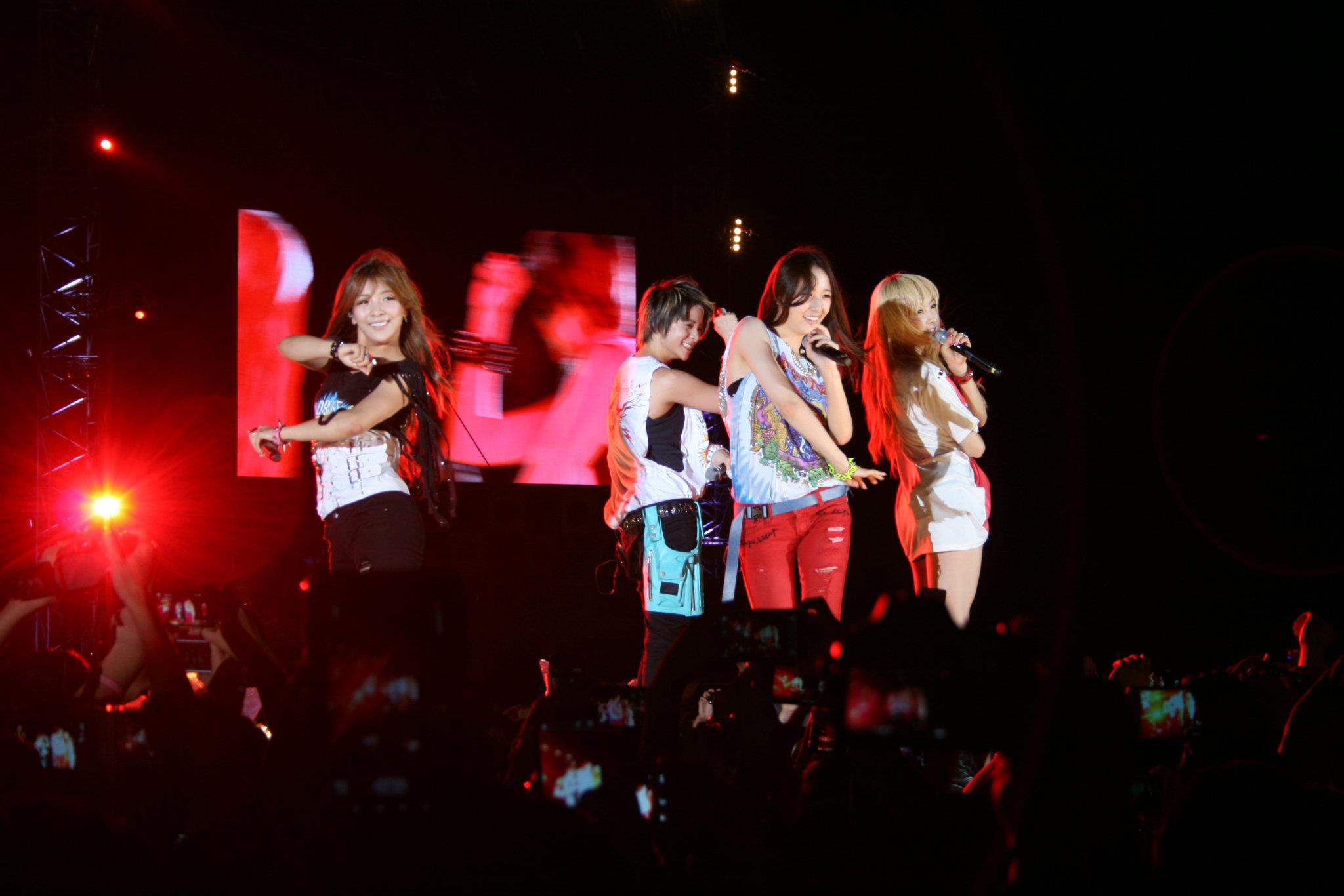 F(x) 여수 엑스포 공연